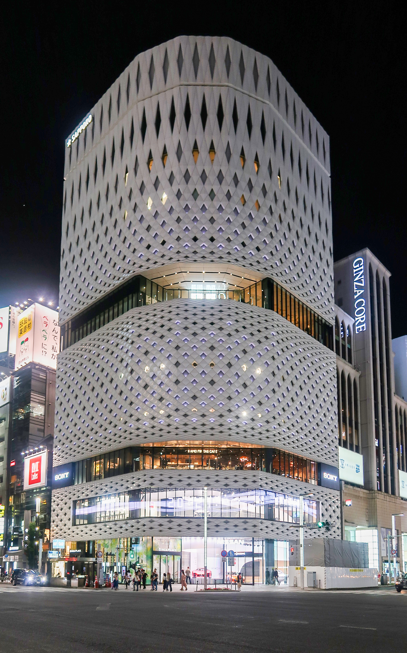 Ginza Place